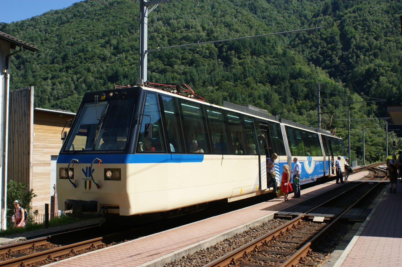 SSIF ABe 8/8 24 im Bahnhof Intragna.